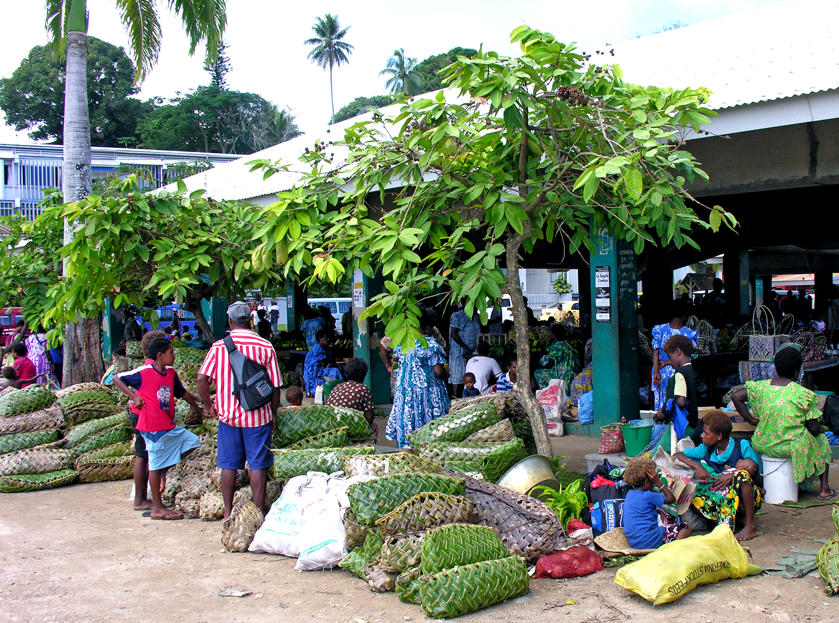 Port Vila market, Vanuatu, 2 June 2006